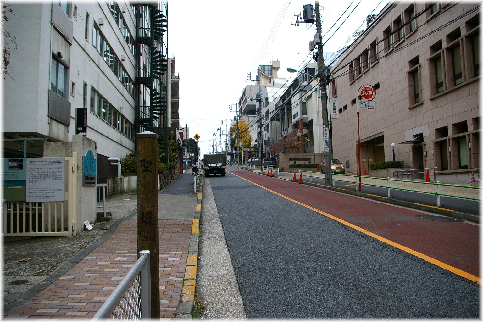 日本の東京都港区にある聖坂(坂下からのアングル)。